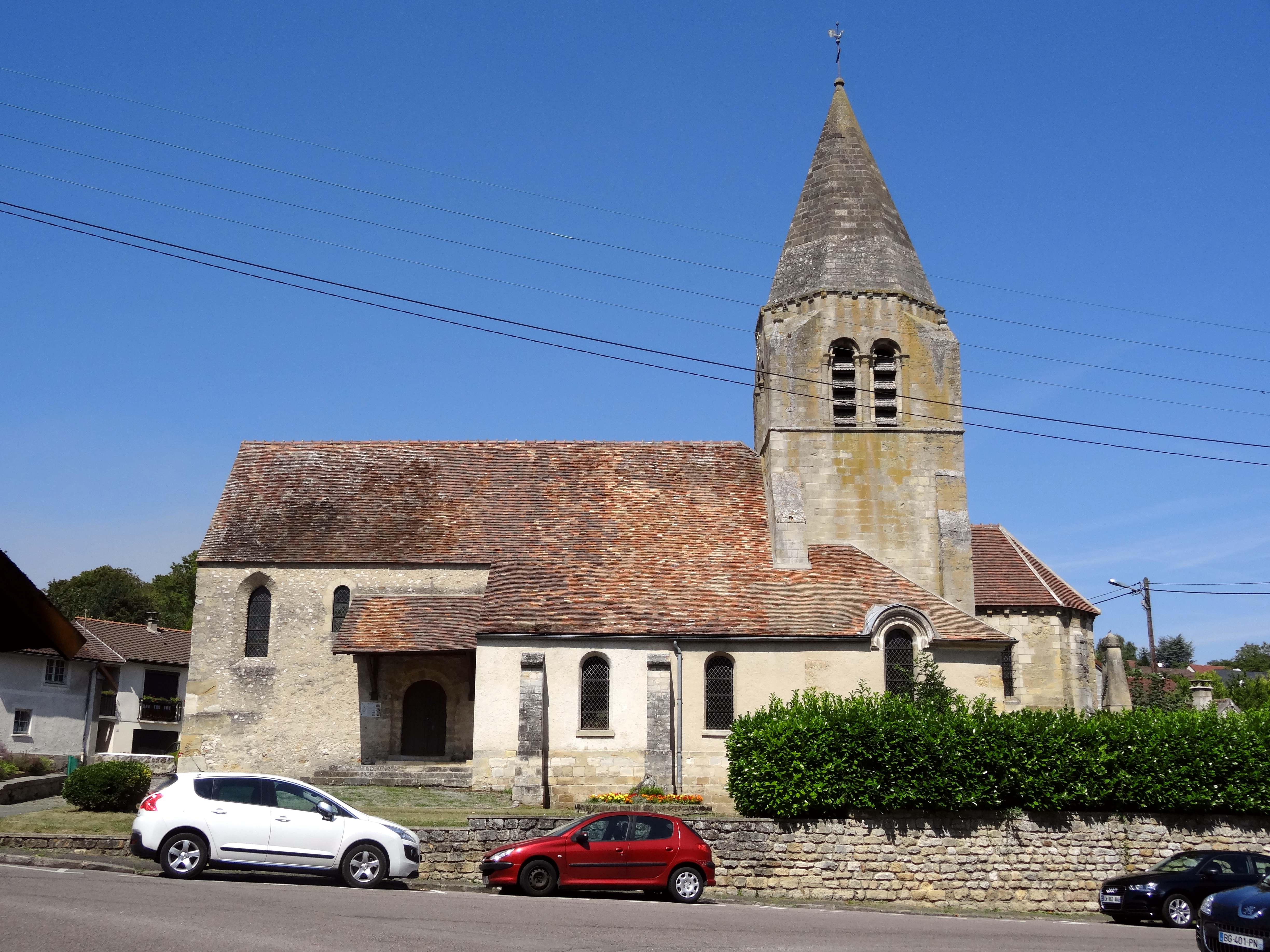 Église Saint-Nicolas de Tessancourt-sur-Aubette - voir titre.